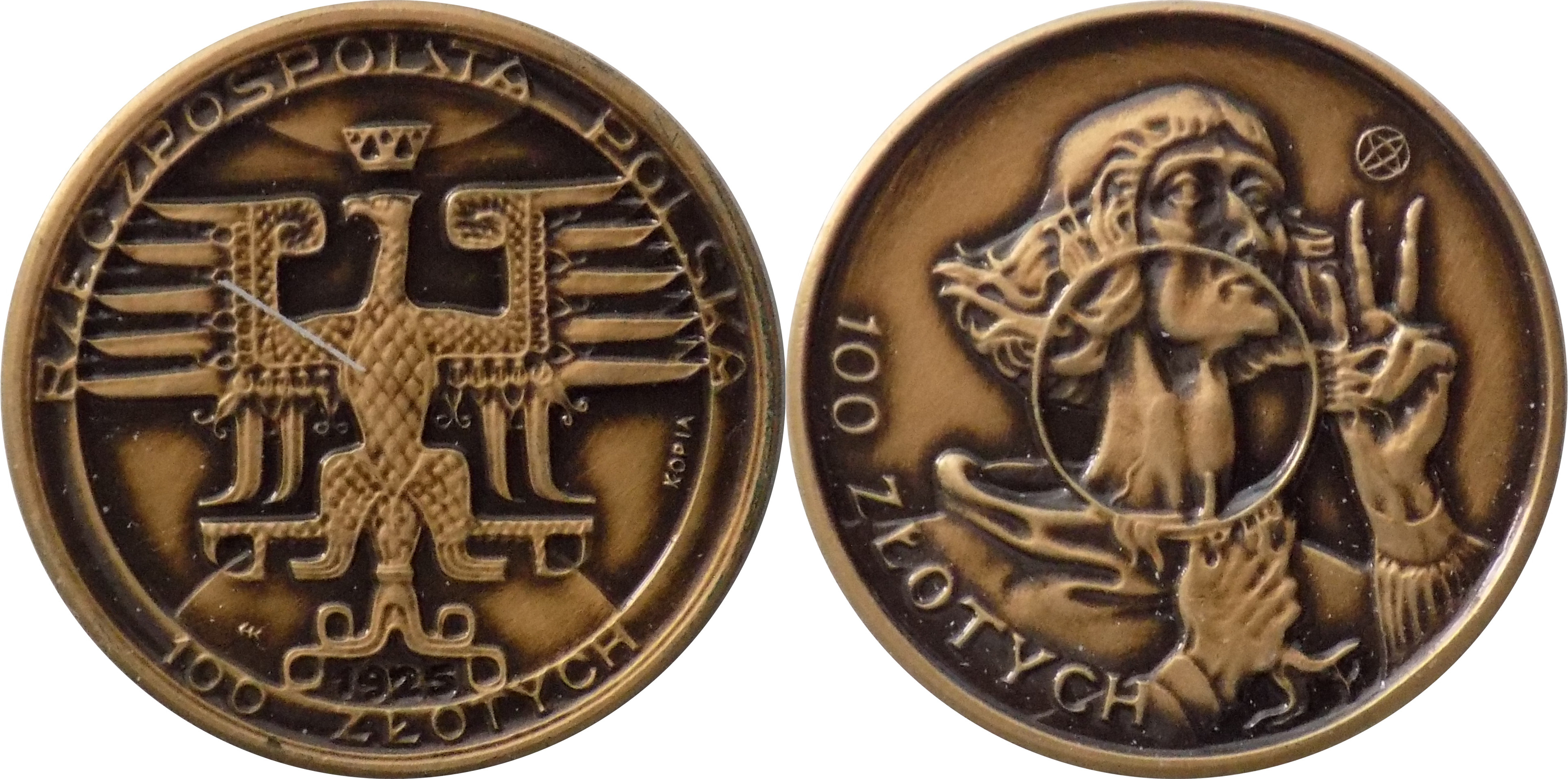 Replika 100 złotych 1925 Mikołaj Kopernik 20.5 mm brąz